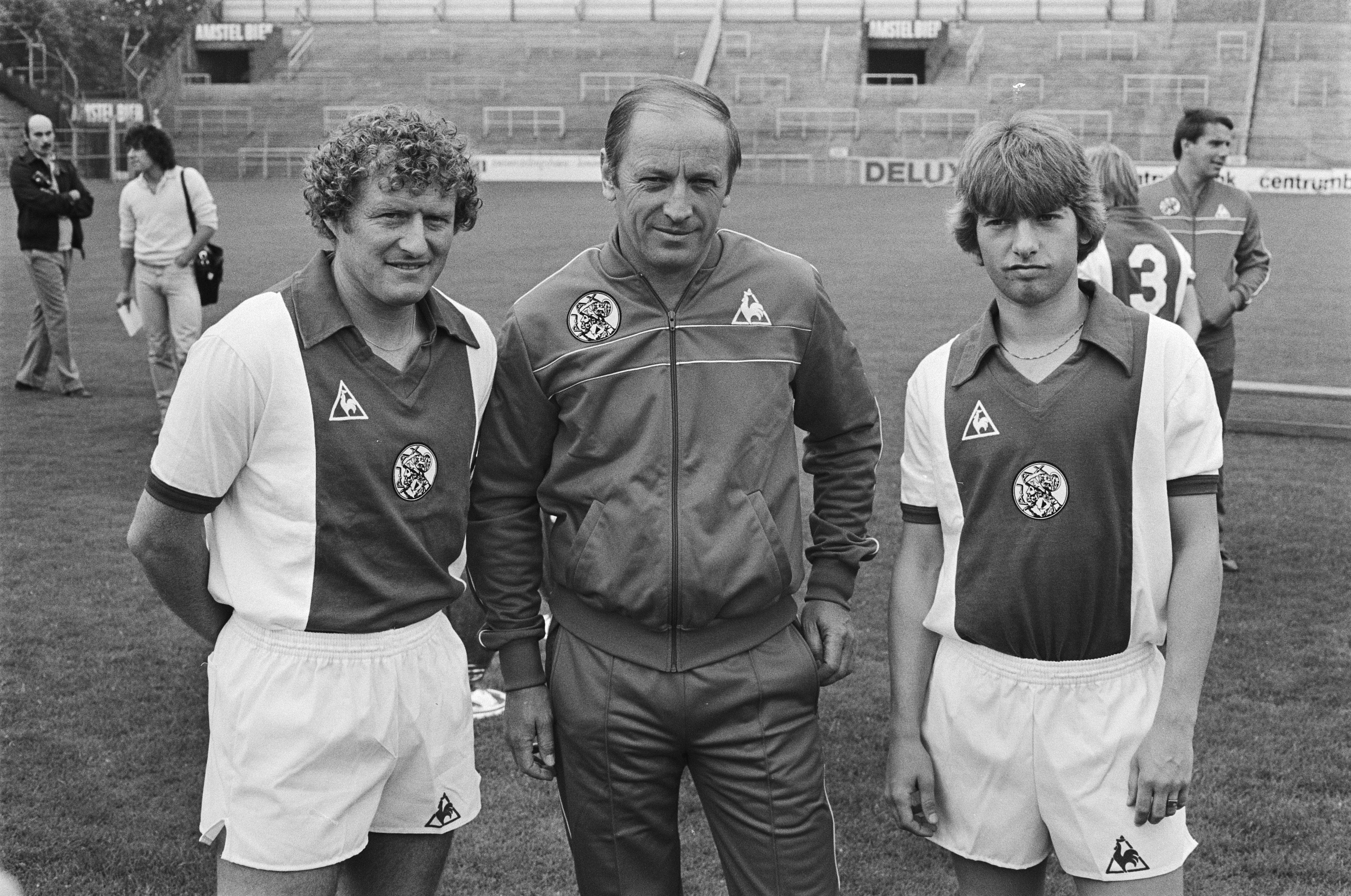 Collectie / Archief : Fotocollectie Anefo Reportage / Serie : [ onbekend ] Beschrijving : Ajaxselectie voor nieuwe seizoen voorgesteld in Amsterdam Wim Jansen , trainer Kurt Linder en nieuwe aanwinst Jepser Olsen Datum : 13 juli 1981 Locatie : Amsterdam, Noord-Holland Trefwoorden : SEIZOENEN, TRAINERS, elftallen, sport, voetbal Persoonsnaam : Jansen, Wim, Linder, Kurt Fotograaf : Antonisse, Marcel / Anefo Auteursrechthebbende : Nationaal Archief Materiaalsoort : Negatief (zwart/wit) Nummer archiefinventaris : bekijk toegang 2.24.01.05 Bestanddeelnummer : 931-5871